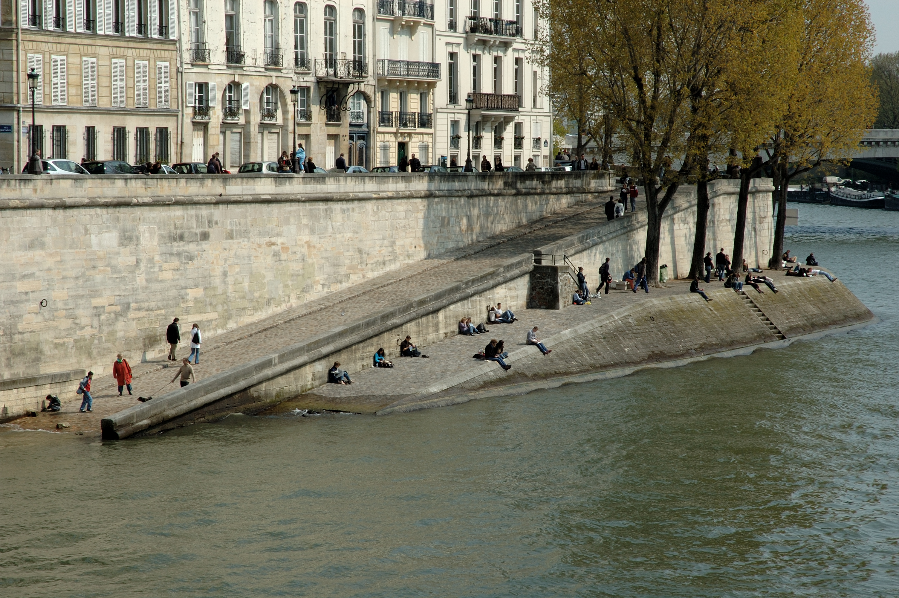 Les quais de la Seine depuis l'ile de la Cité et en regardant l'ile Saint Louis, Paris, France.